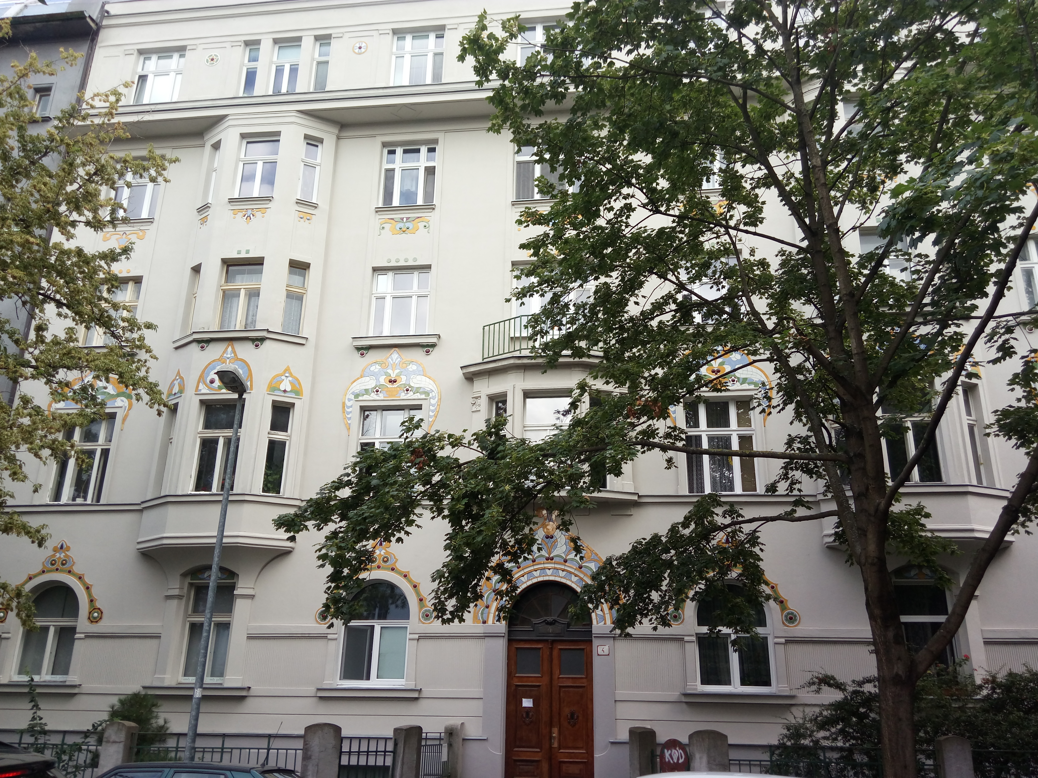 Sienkiewiczova, Staré Mesto, Bratislava